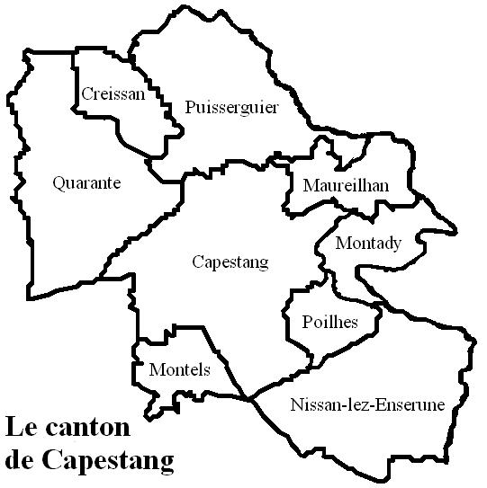 Le canton de Capestang image personnelle